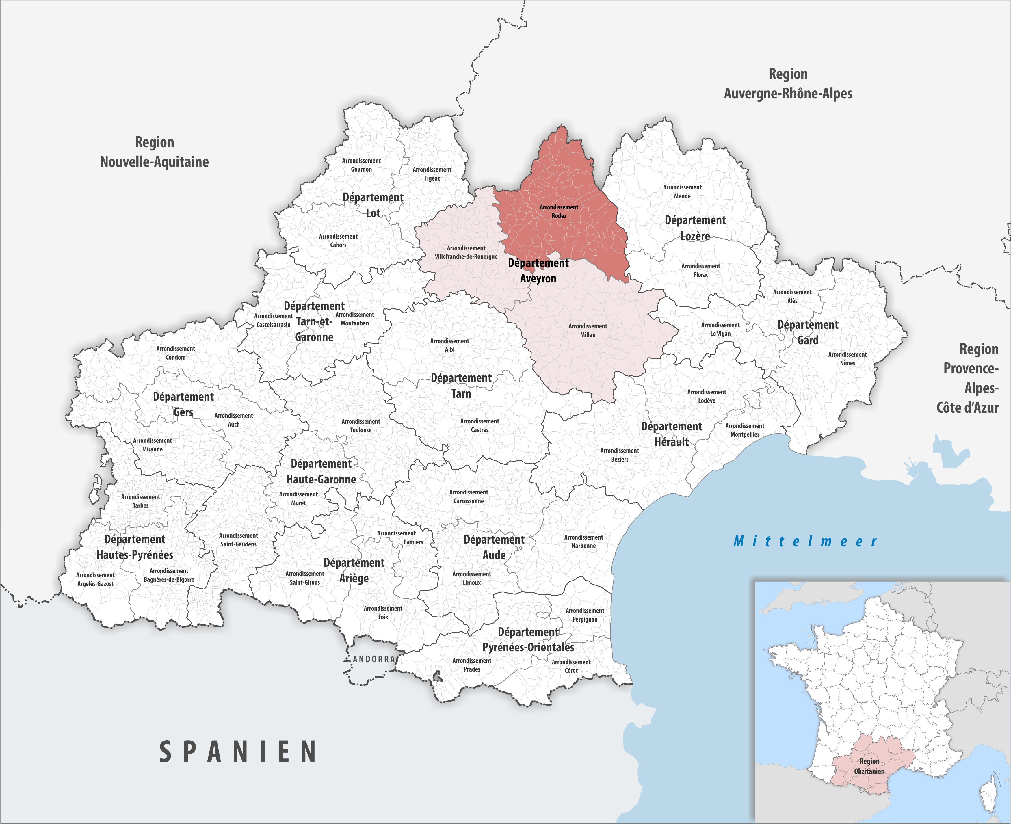 Lage des Arrondissements Rodez